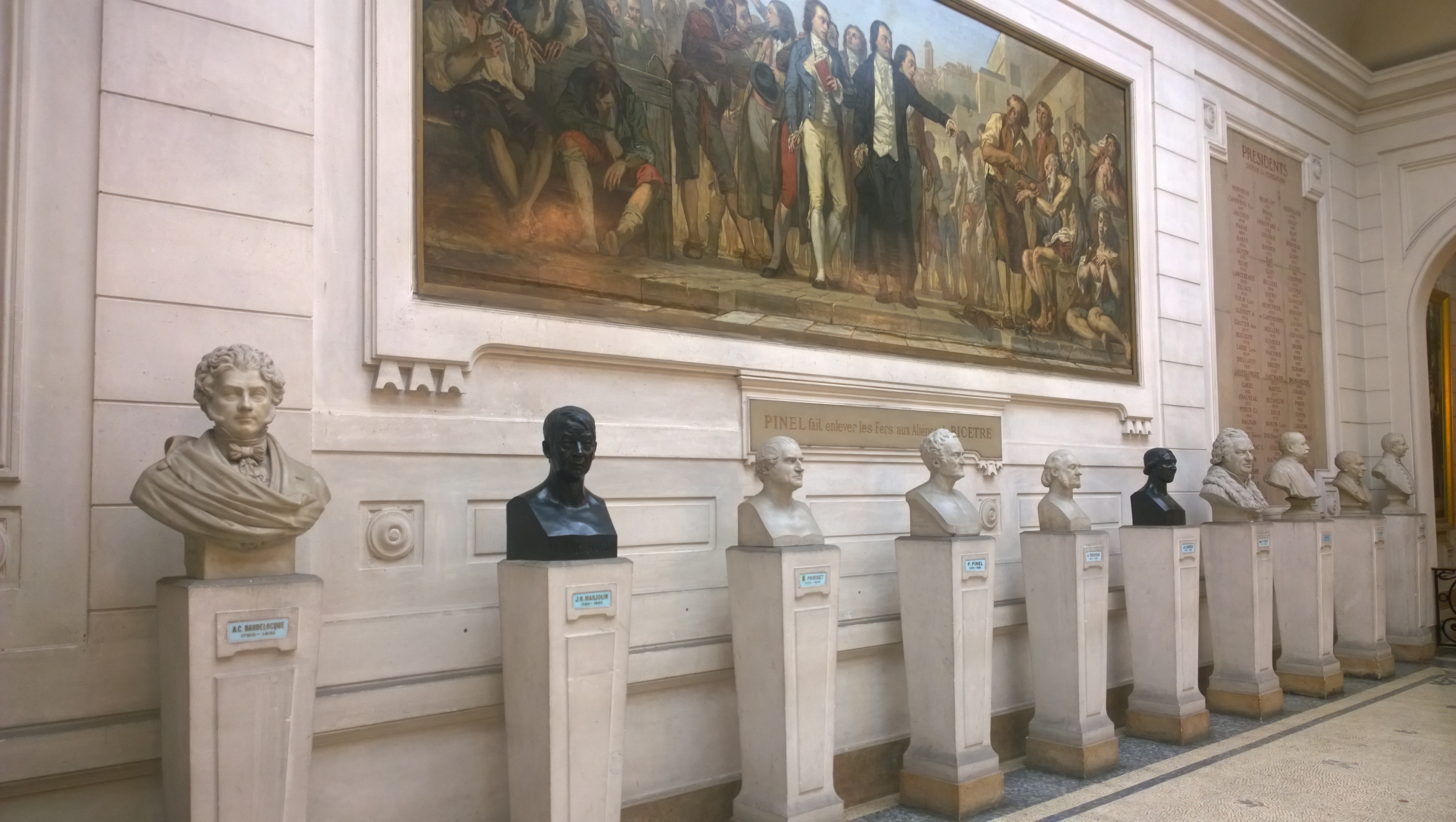 Bustes alignés sous le tableau de Charles-Louis Muller (Français, 1815-1892) intitulée Pinel fait enlever les fers aux aliénés de Bicêtre, huile sur toile, dans le hall de réception de l'Académie nationale de médecine, rue Bonaparte, Paris, France.Les bustes représentent, de gauche à droite: A. C. Baudelocque, Jean-Nicolas Marjolin Étienne Pariset Philippe Pinel Armand Trousseau Joseph Bienaimé Caventou ? ? ? ?